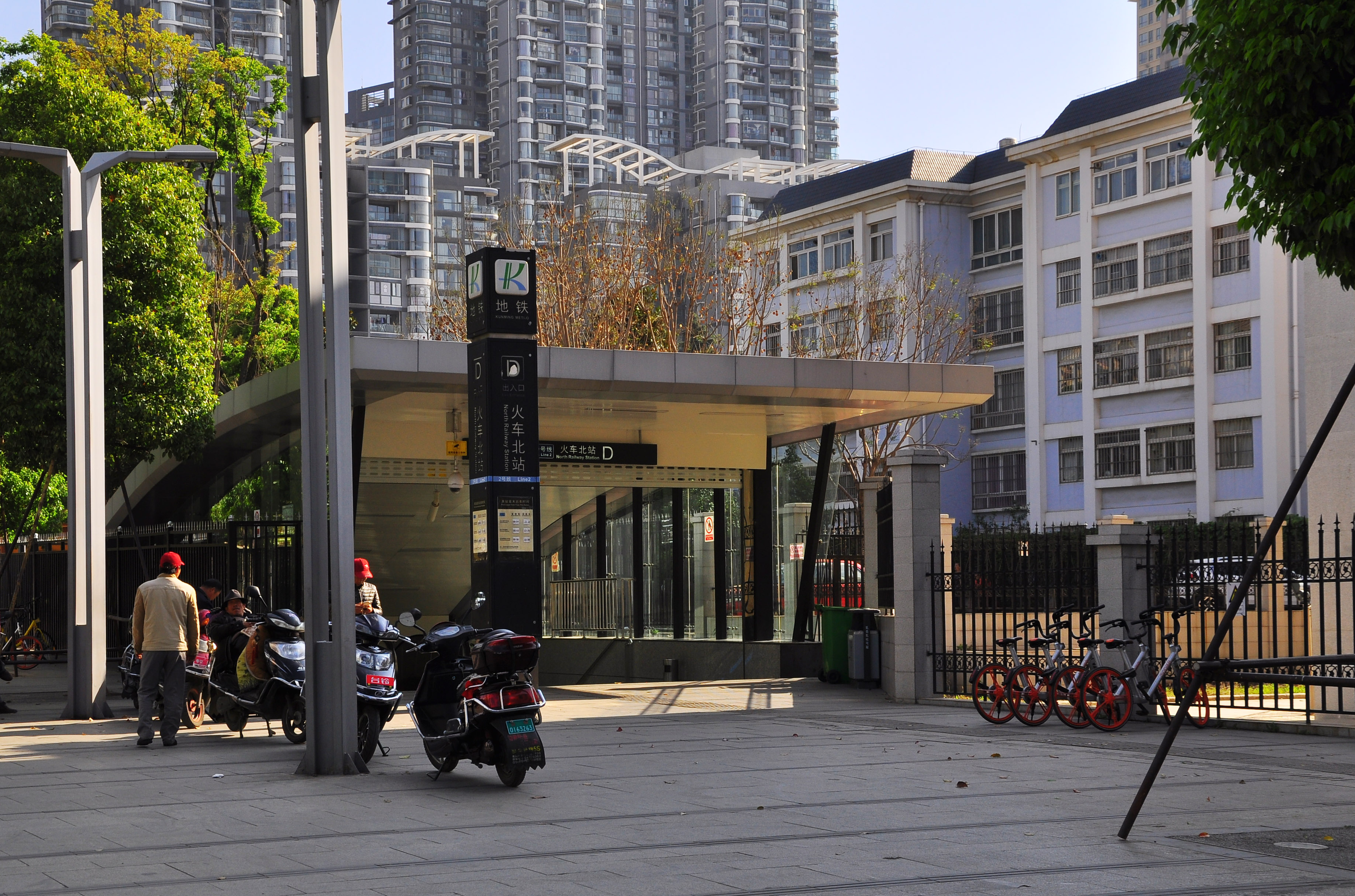 昆明地铁2号线火车北站。